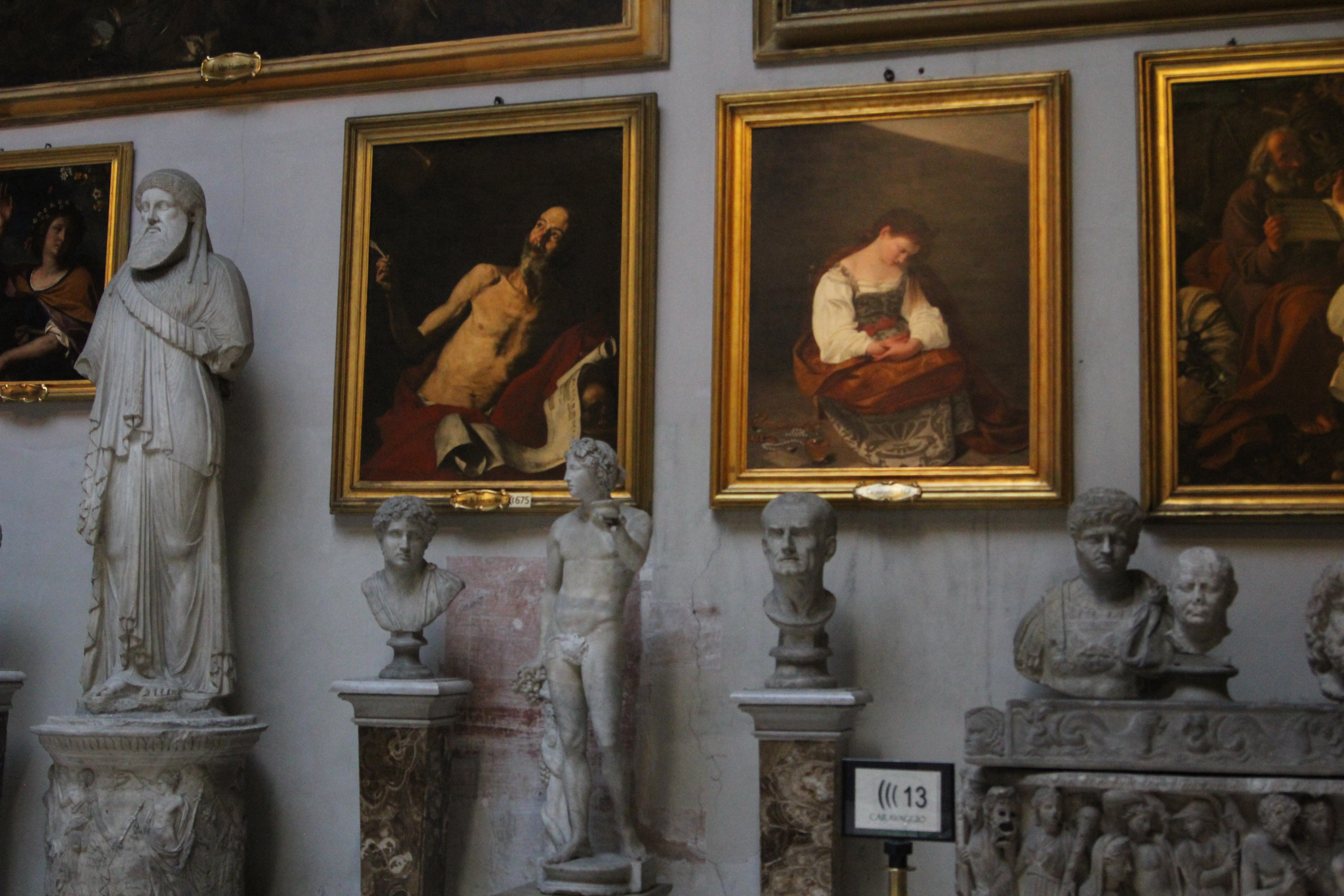 Vue de l'une des salles de la Galerie Doria Pamphilj, avec notamment le Saint Jérôme de José de Ribera et la Marie-Madeleine repentante du Caravage.